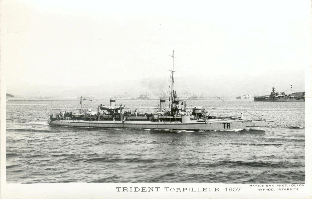 Destroyer (contre-torpilleur) français Trident de classe Claymore.